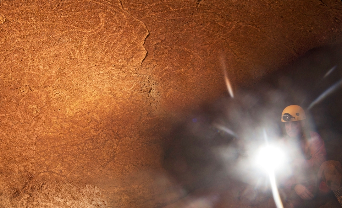 Foto del panel de grabados de la cueva de Armintxe sacada el día del hallazgo (1 de mayo de 2016)